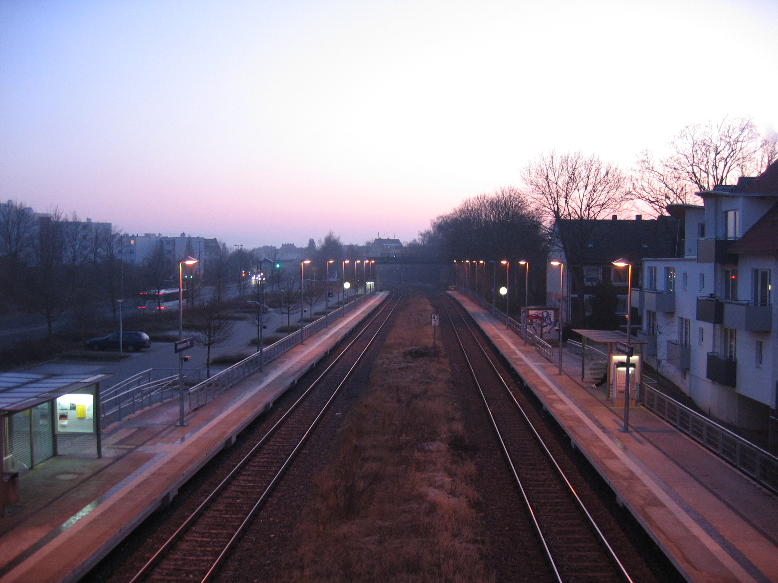 Bahnhaltepunkt Hildesheim Ost